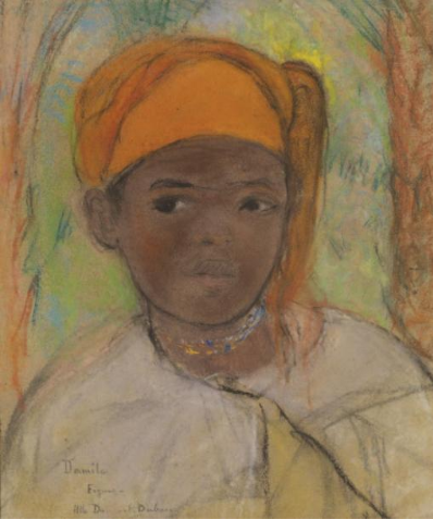 "Damila"